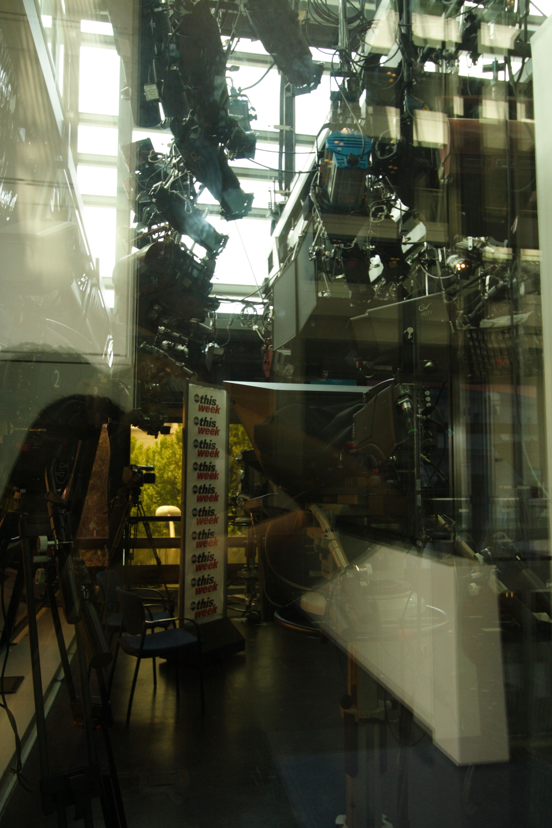 Телестудия в Newseum